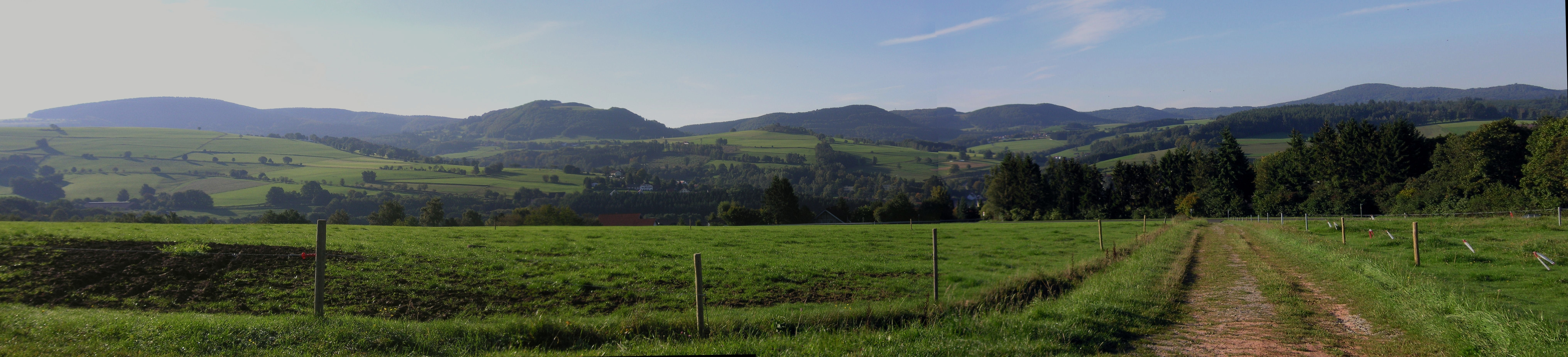 Blick vom Aufstieg zur Eube nach Süden auf den Dammersfeldrücken (links die "Hohe Hölle", rechts die Dammersfeldkuppe)